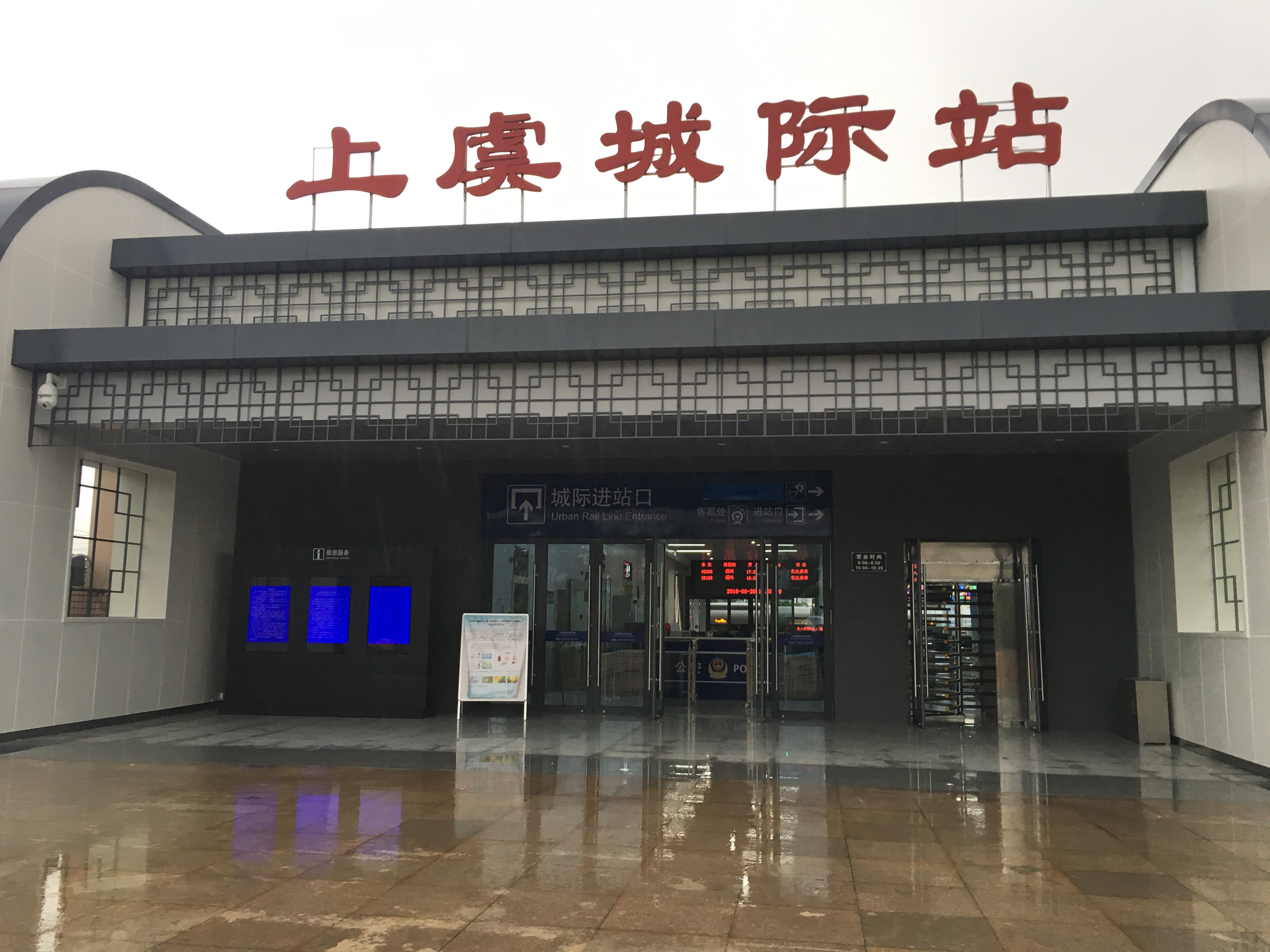 中文（中国大陆）: 上虞站城际铁路入口